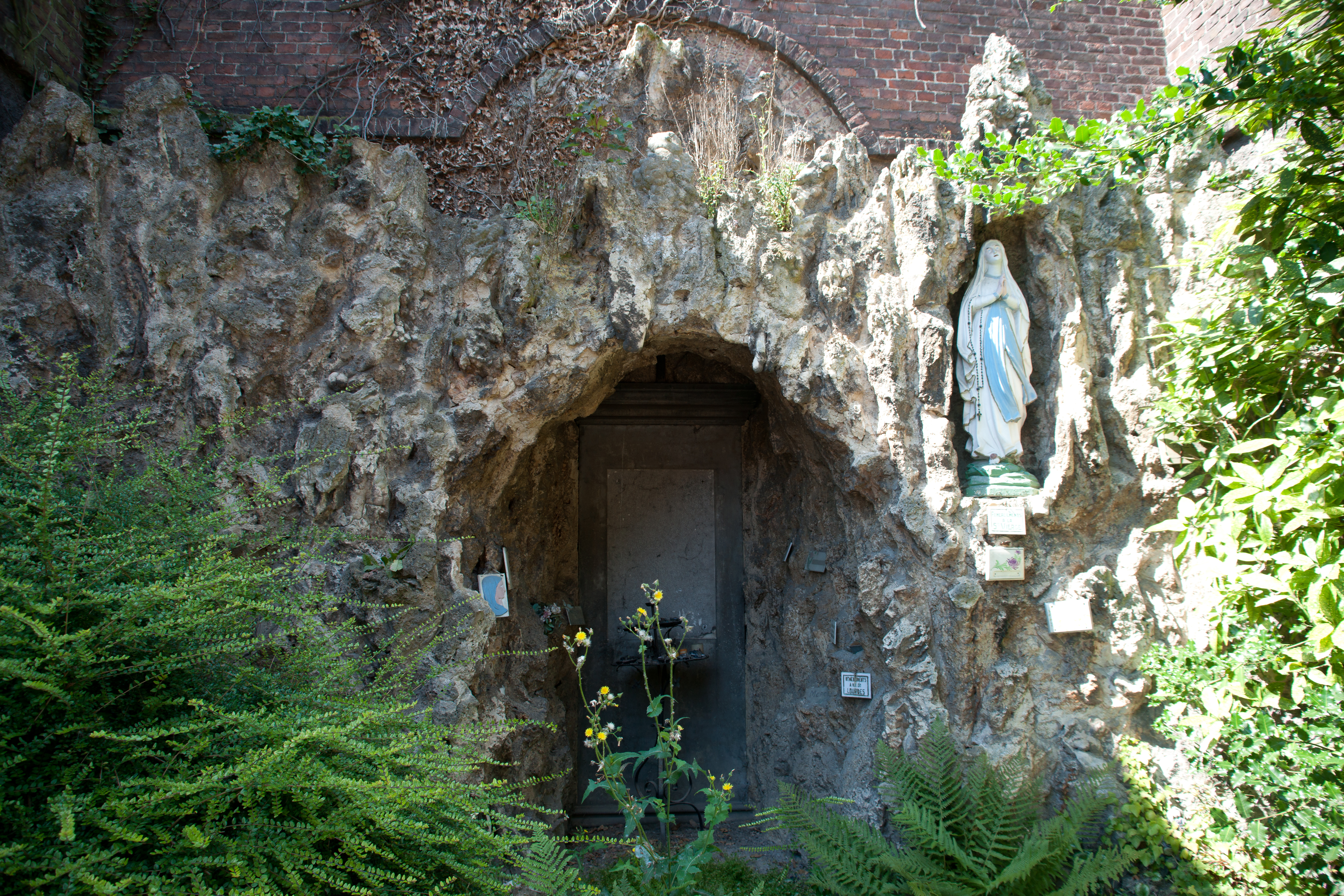 Hermalle-sous-Huy - ferme castrale - grotte (détail)